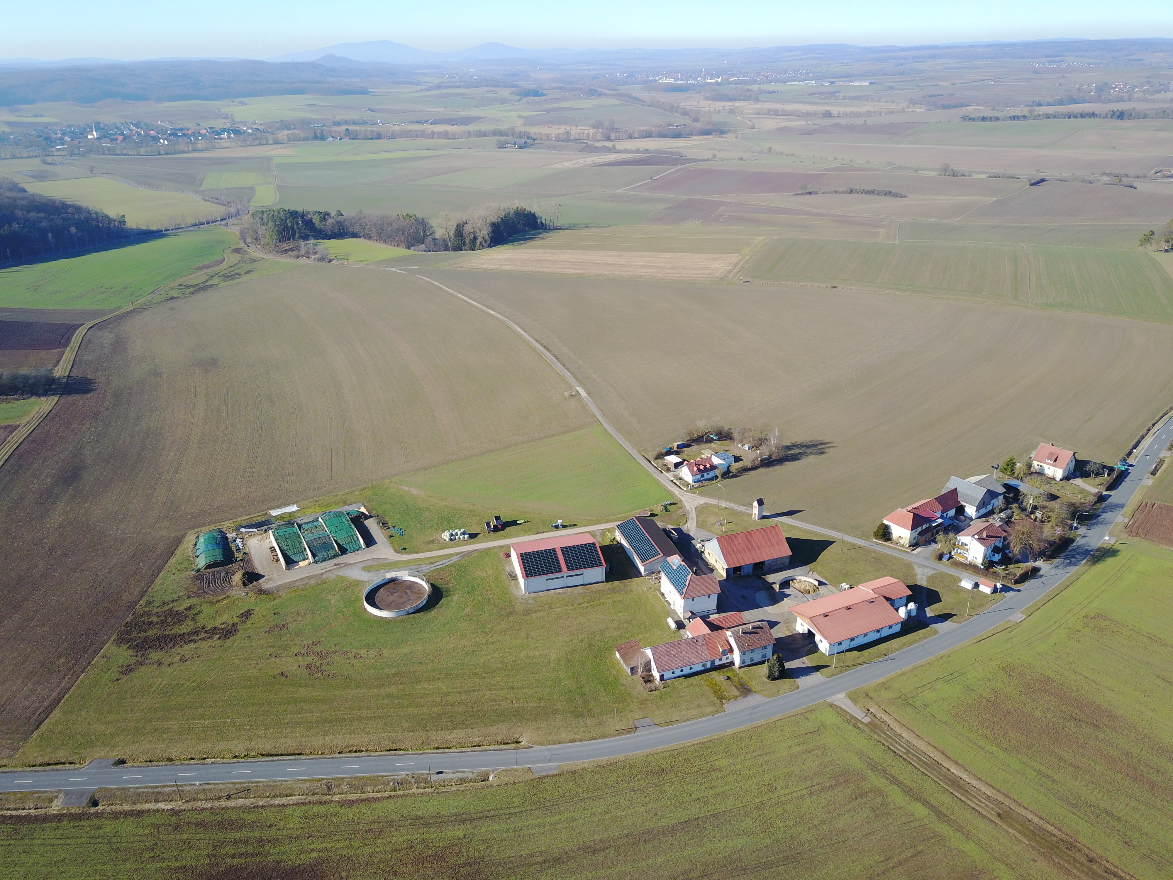 Blick aus Richtung Osten